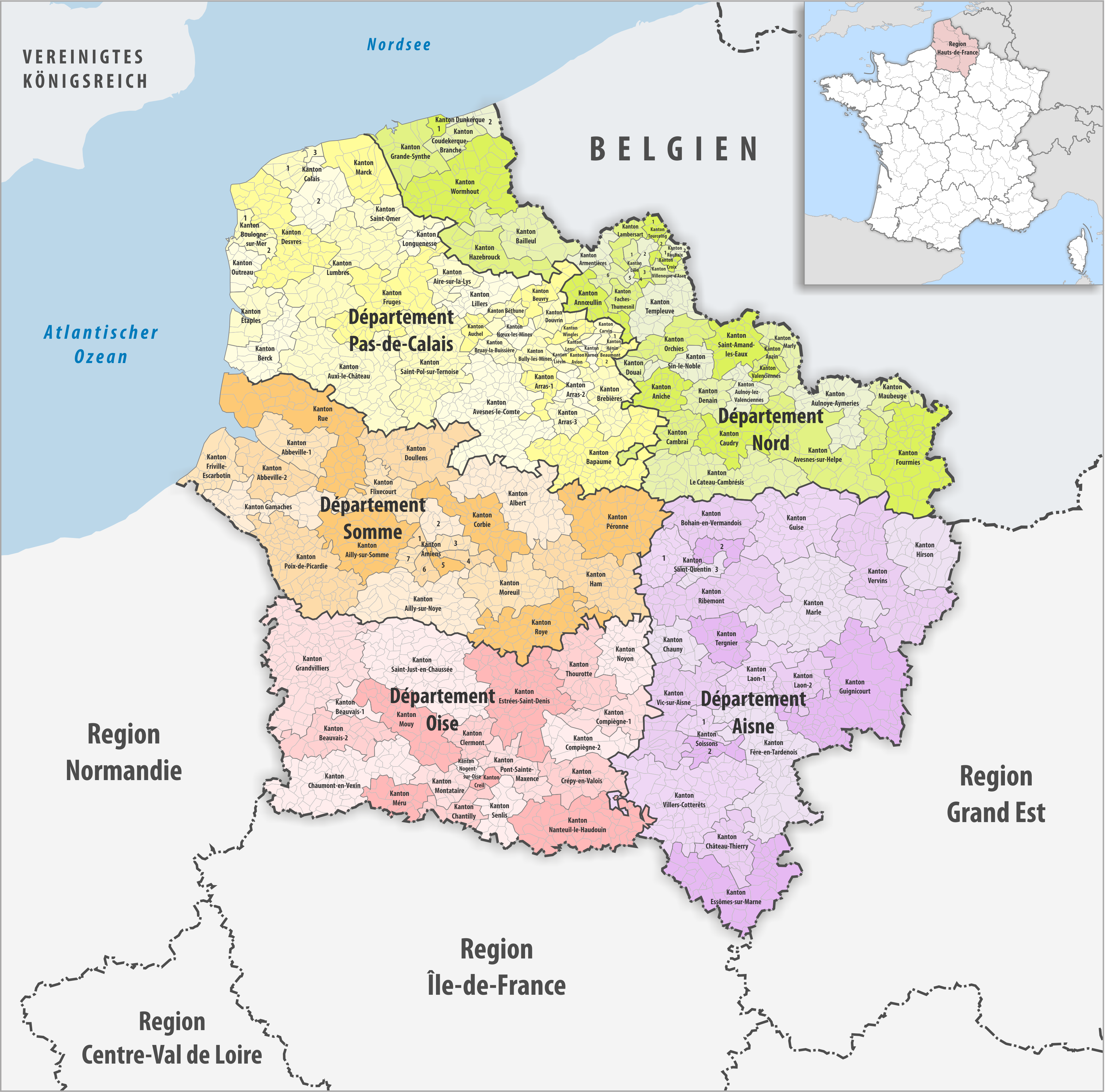 Gemeinden, Kantone und Departemente in der Region Hauts-de-France